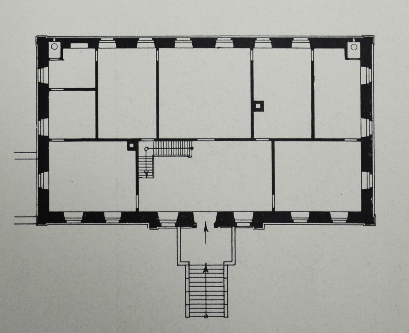 Grundriss des Hauses Tinne